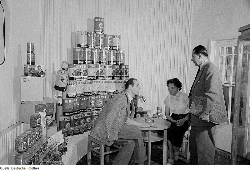 Original image description from the Deutsche Fotothek Personen vor Lebensmittelkonserven der belgischen Sektion auf der Leipziger Herbstmesse 1954